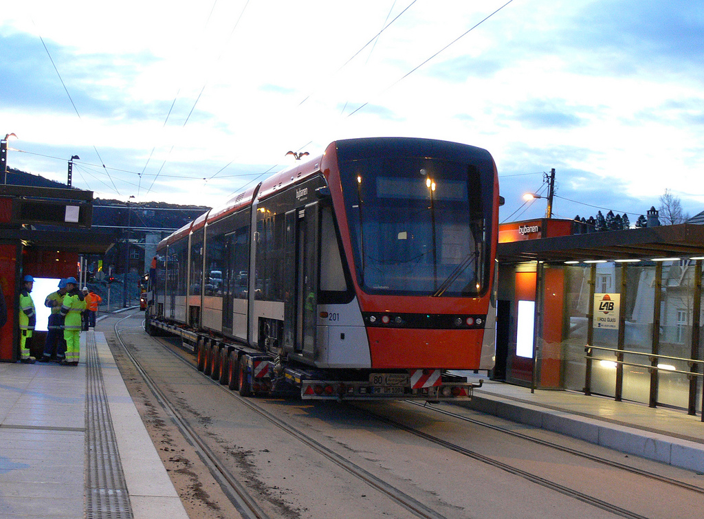 Første bybanevogn på plass